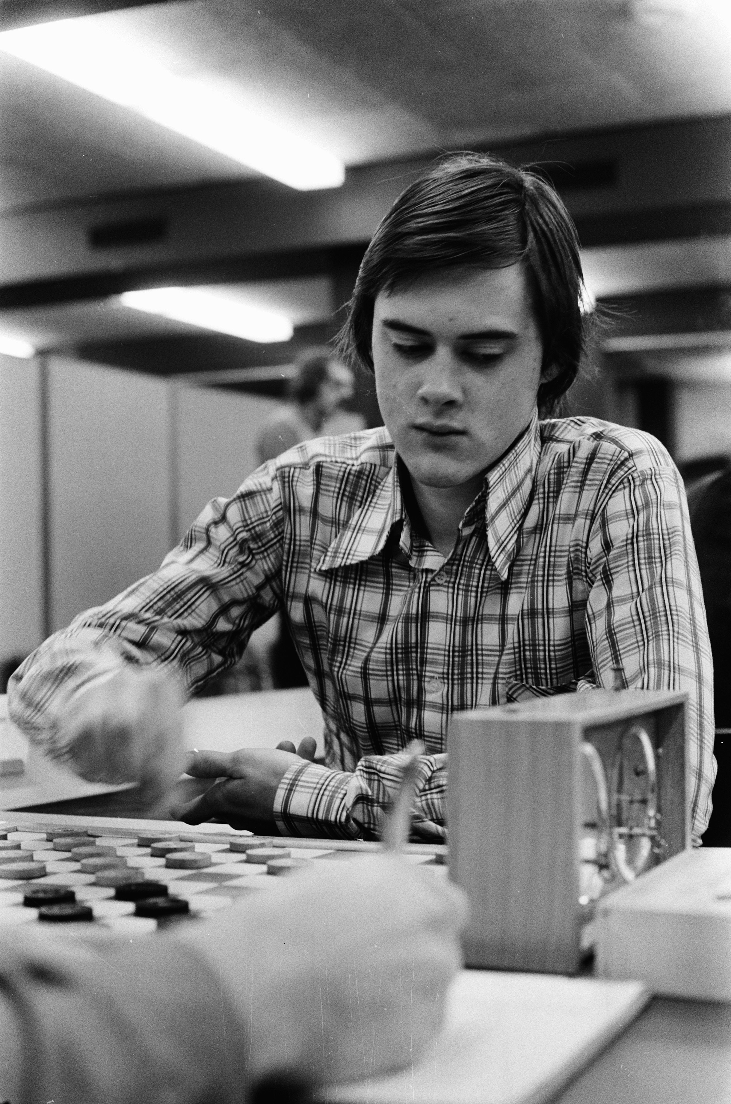 Nederlandse kampioenschap dammen Amsterdam, Jeroen Goudt in actie